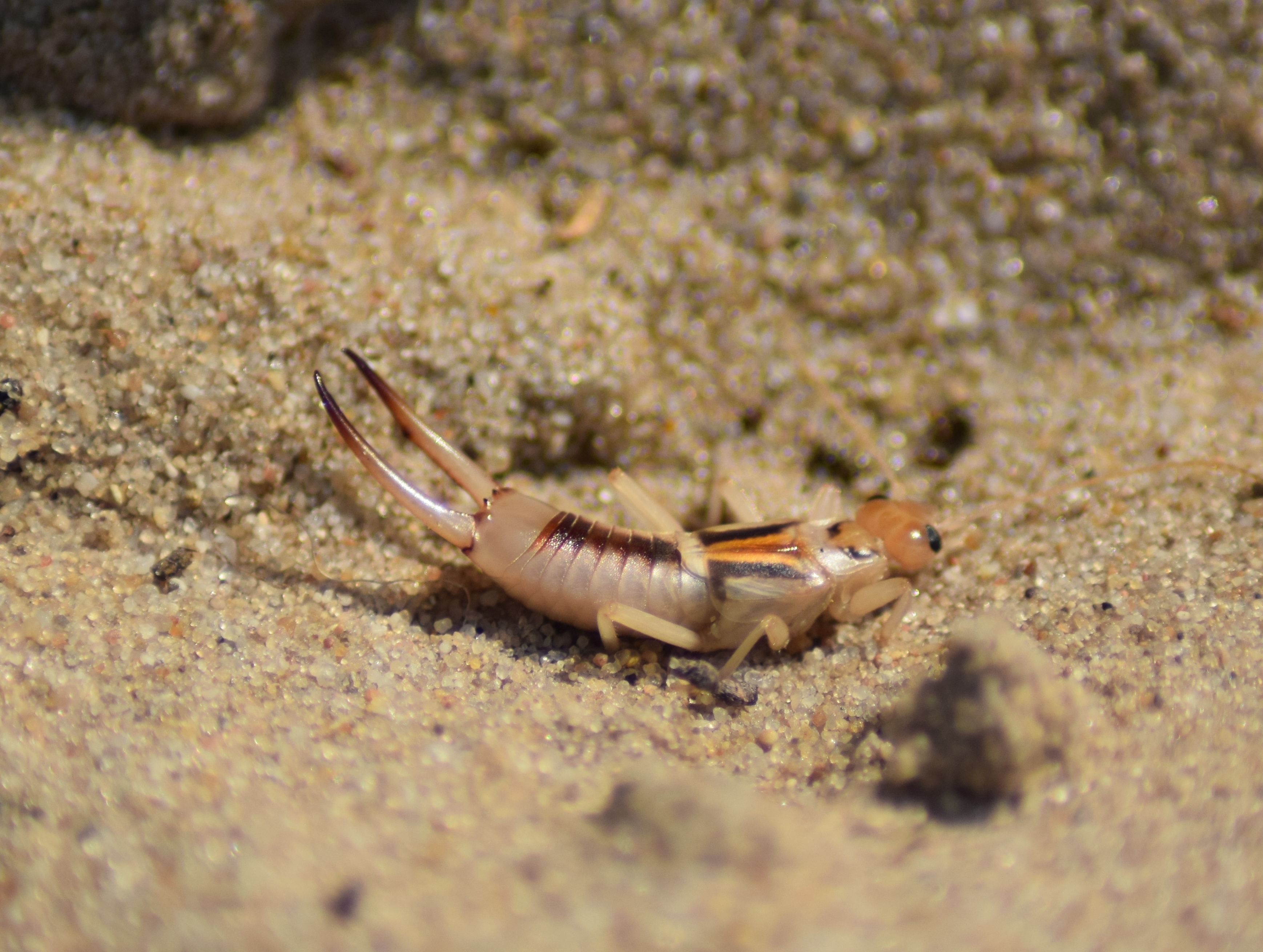 Zandoorworm (Labidura riparia), foto genomen in augustus 2019 in de Korte Duinen, Soest.